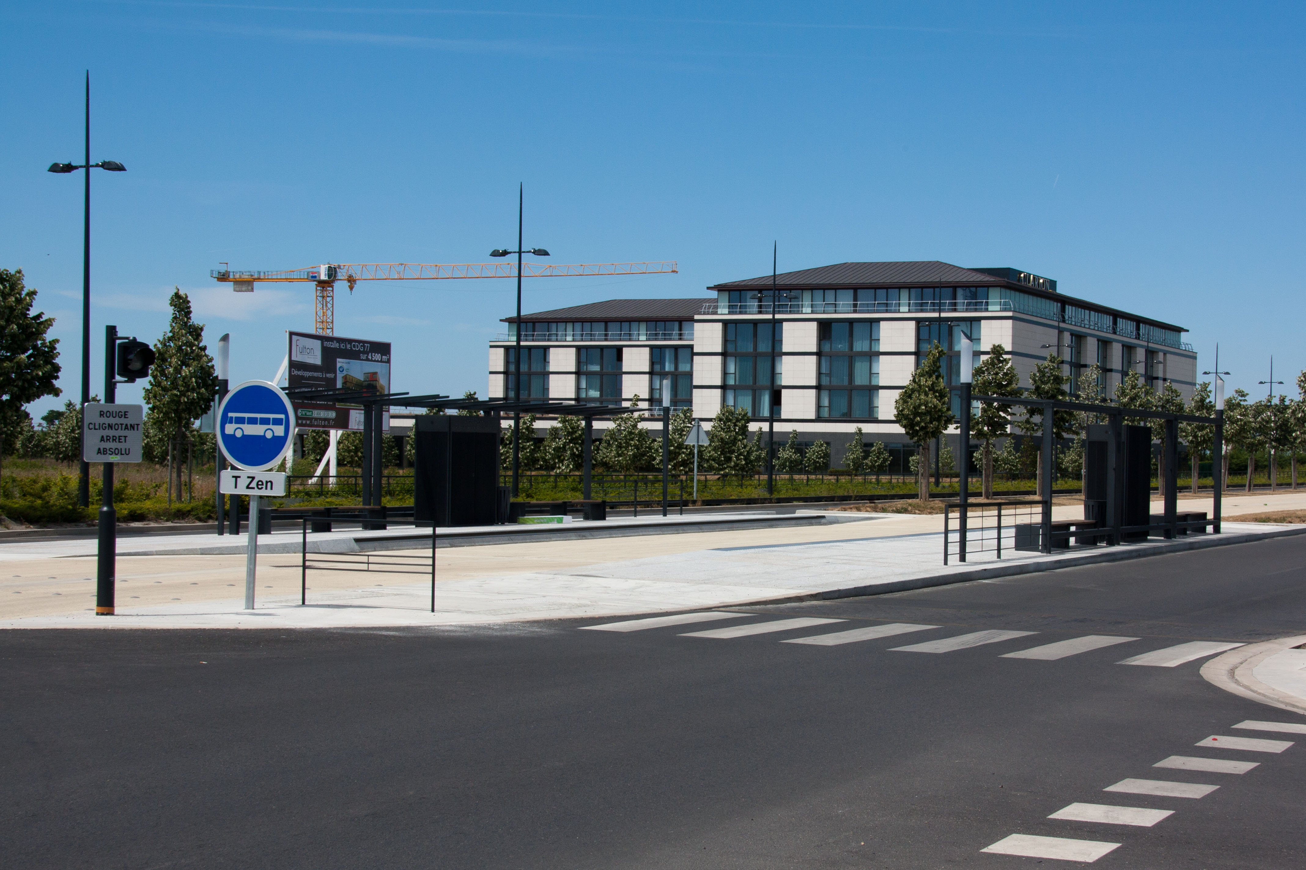 T-ZEN Ligne 1 - station de la ligne - Département de l'Essonne et de Seine-et-Marne